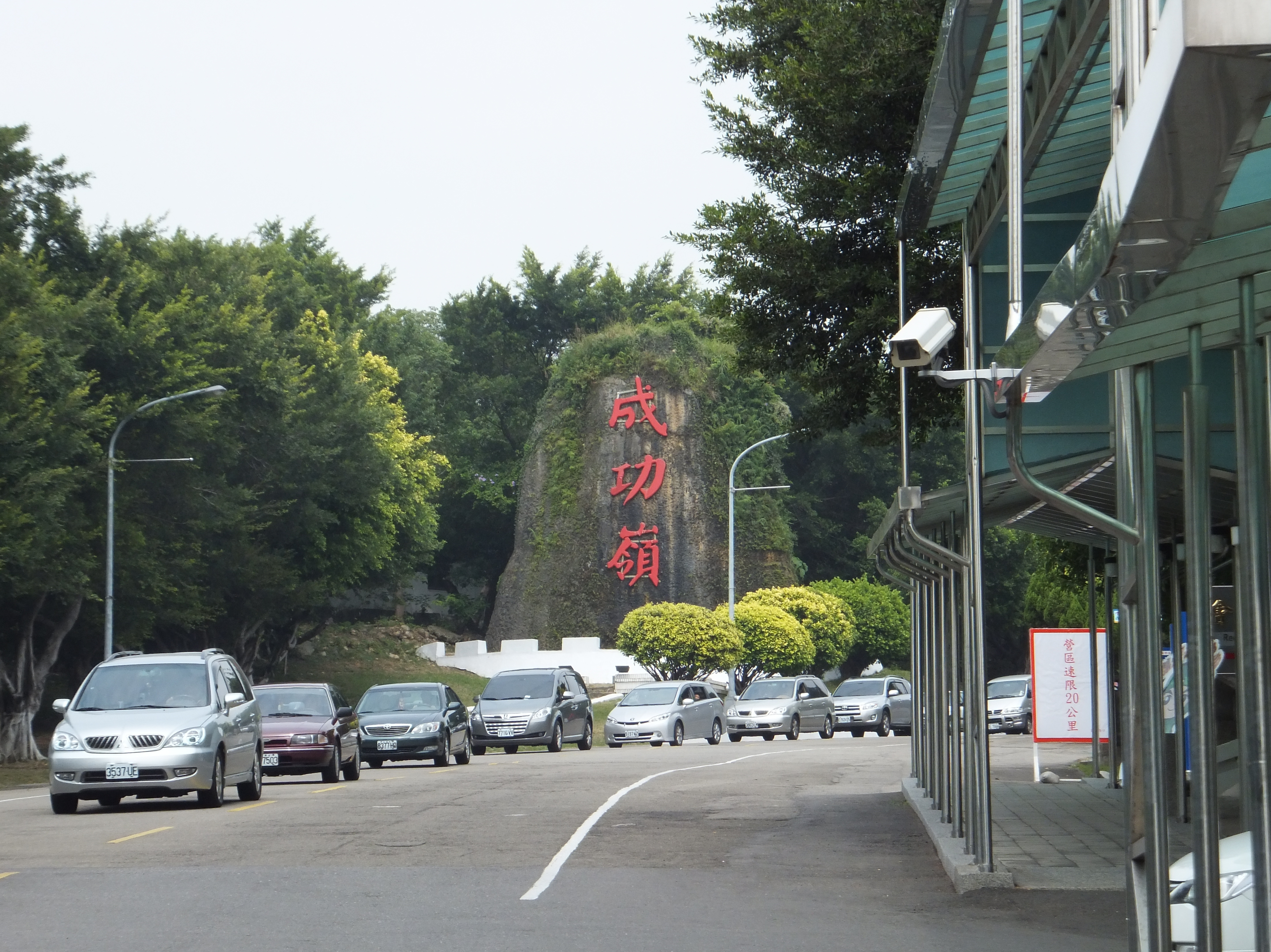 成功嶺摩崖，攝於1號門警衛中心外。